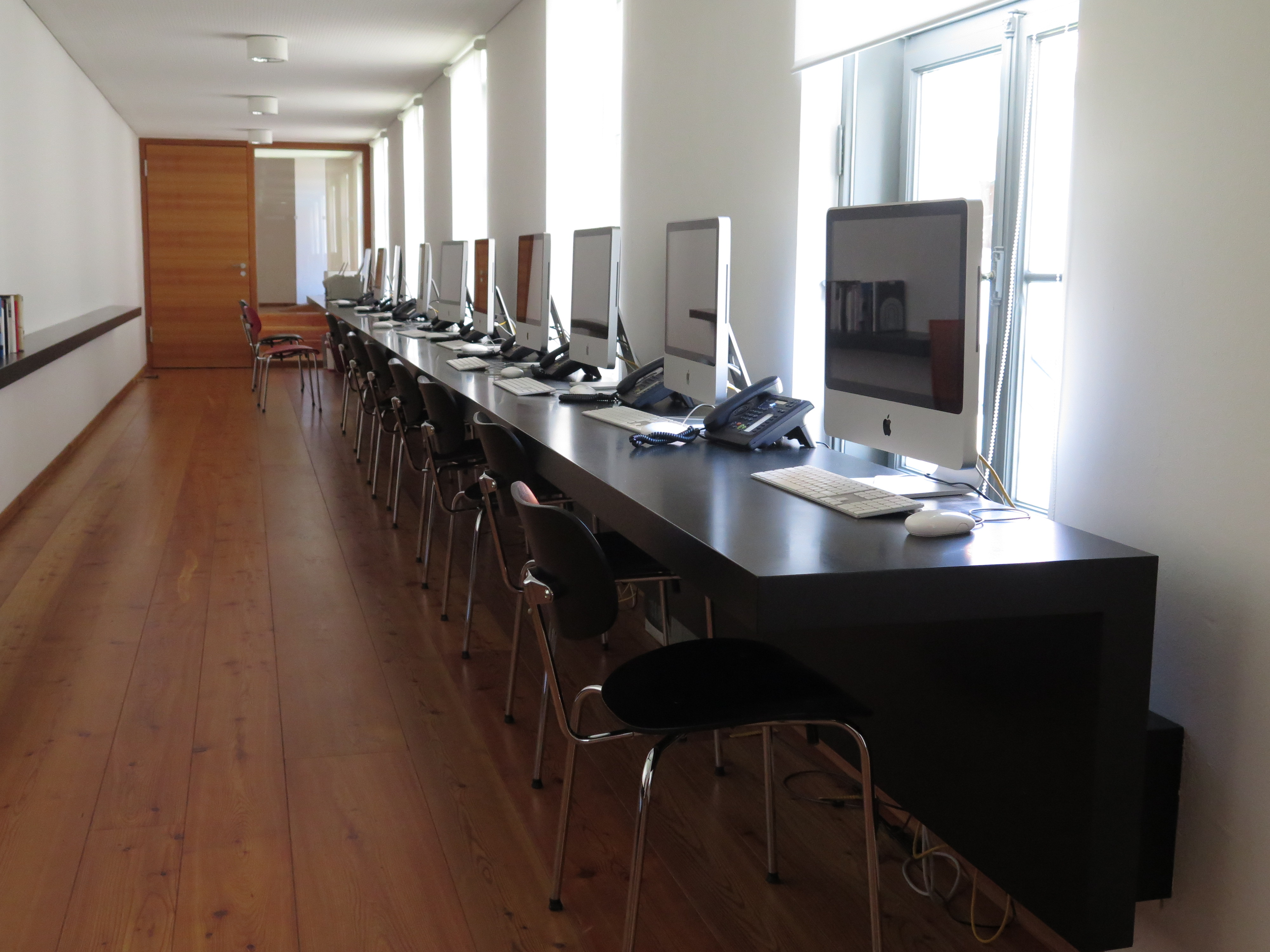 Arbeitsraum im ifp mit Computern und Festtelefonen ausgestattet